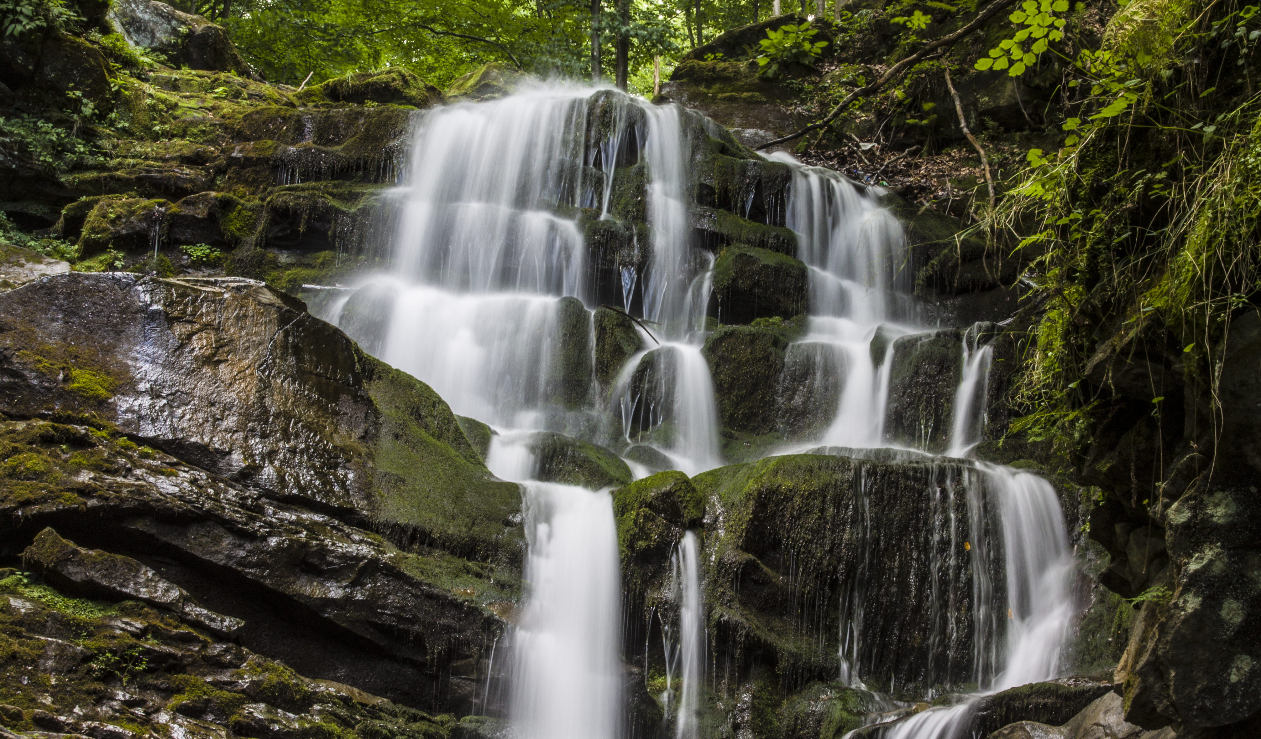 «Водоспад Шипіт», Міжгірський р-н, ДП «Міжгірське ЛГ», Ізківське л-во, урочище «Шипіт» квартал 12